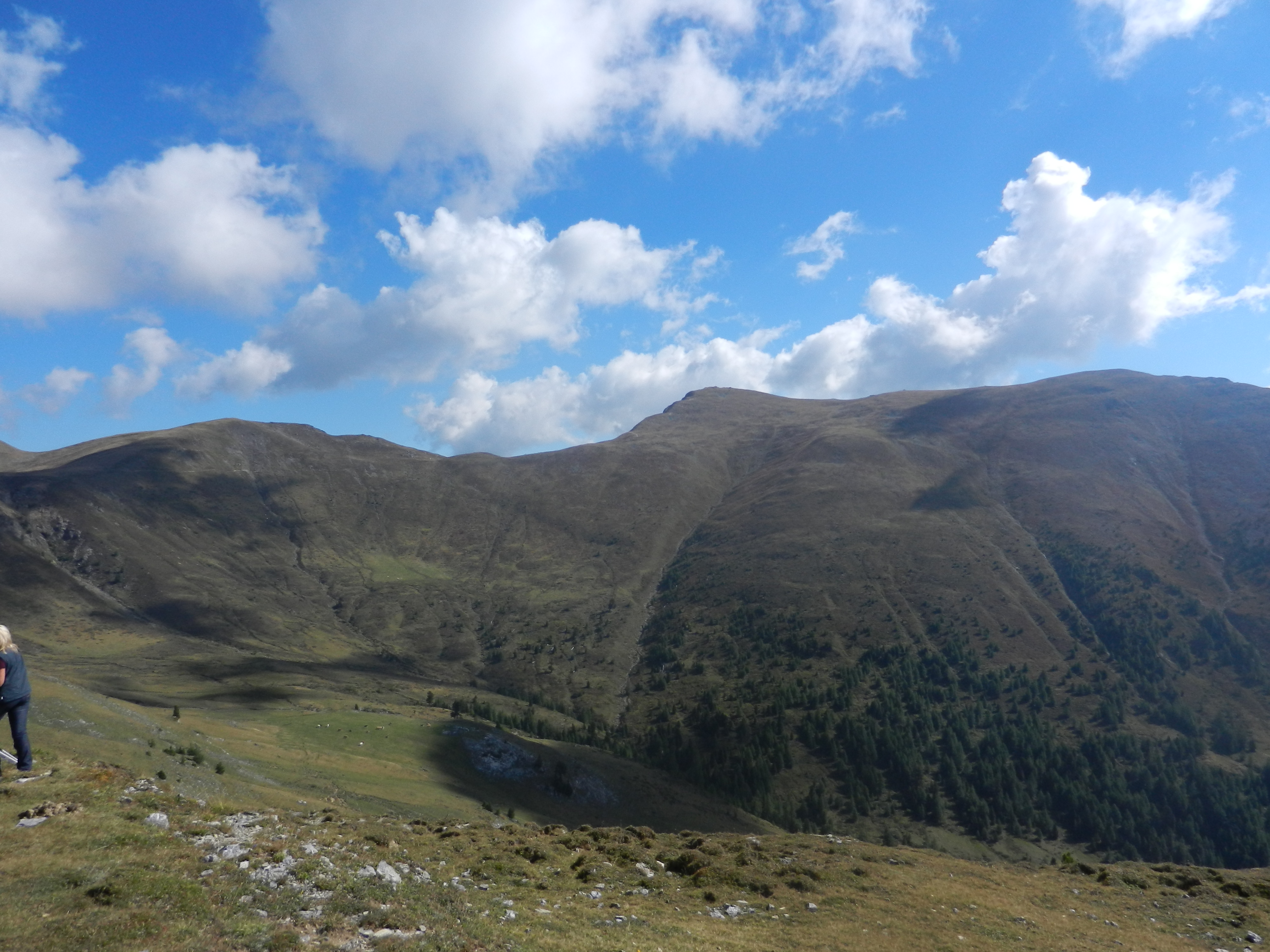 Königsstuhl v pogorju Nockberge, Avstrija.